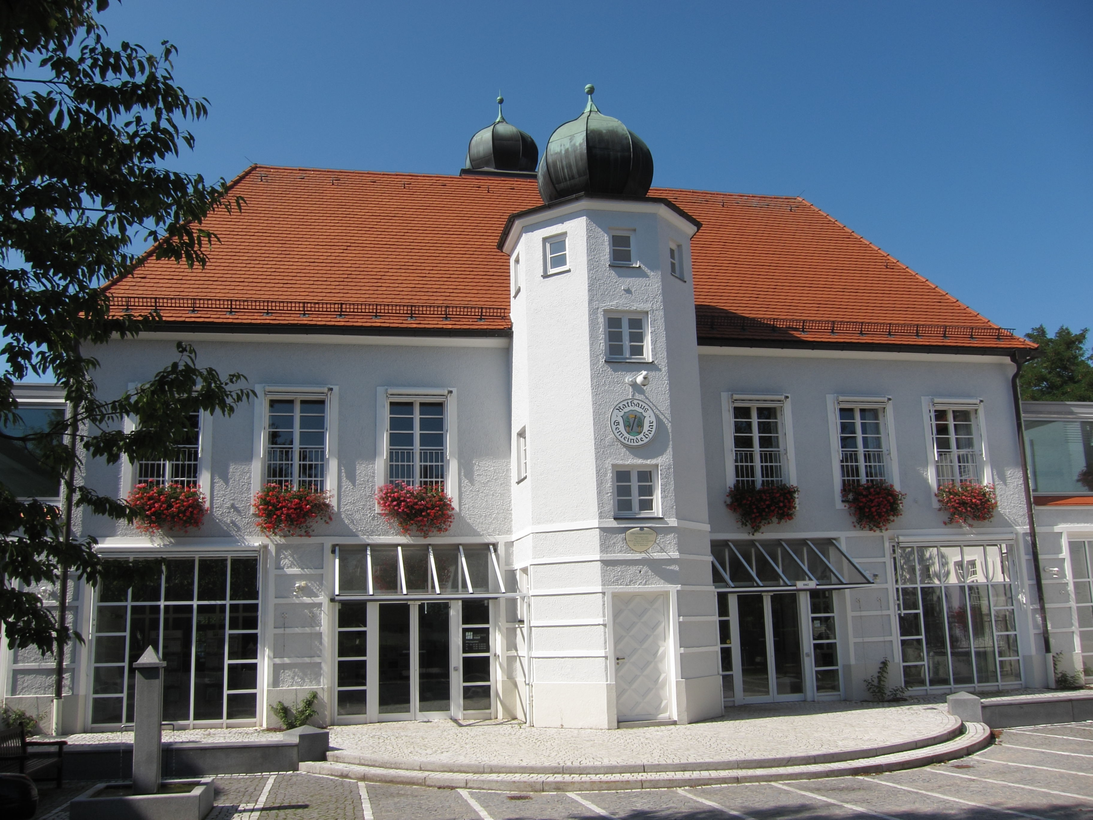 Bahnhofstraße 7 1/2, ehemaliges Feuerwehrhaus, jetzt Rathaus; zweigeschossiger Putzbau mit Walmdach, polygonaler Treppenturm und Trockenturm für Feuerwehrschläuche, 1929.